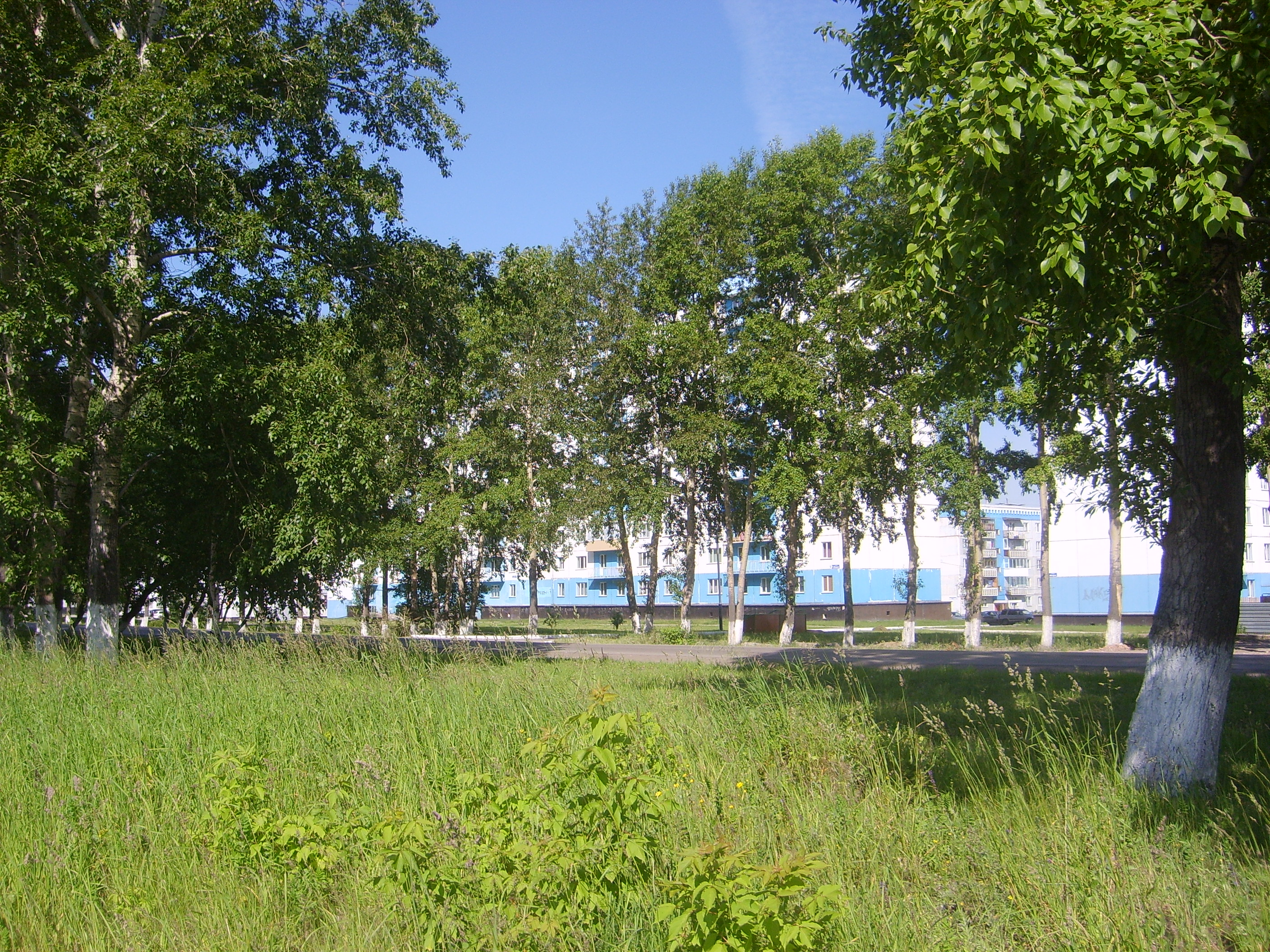 Вид на новостройки ул. Мира из-за деревьев.